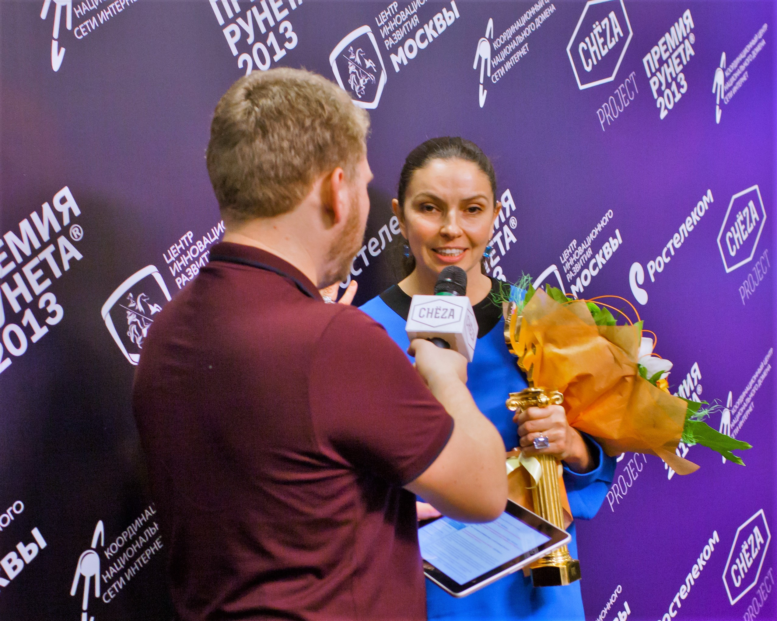 Церемония вручения Премии Рунета за 2013 год. Москва, РИА Новости